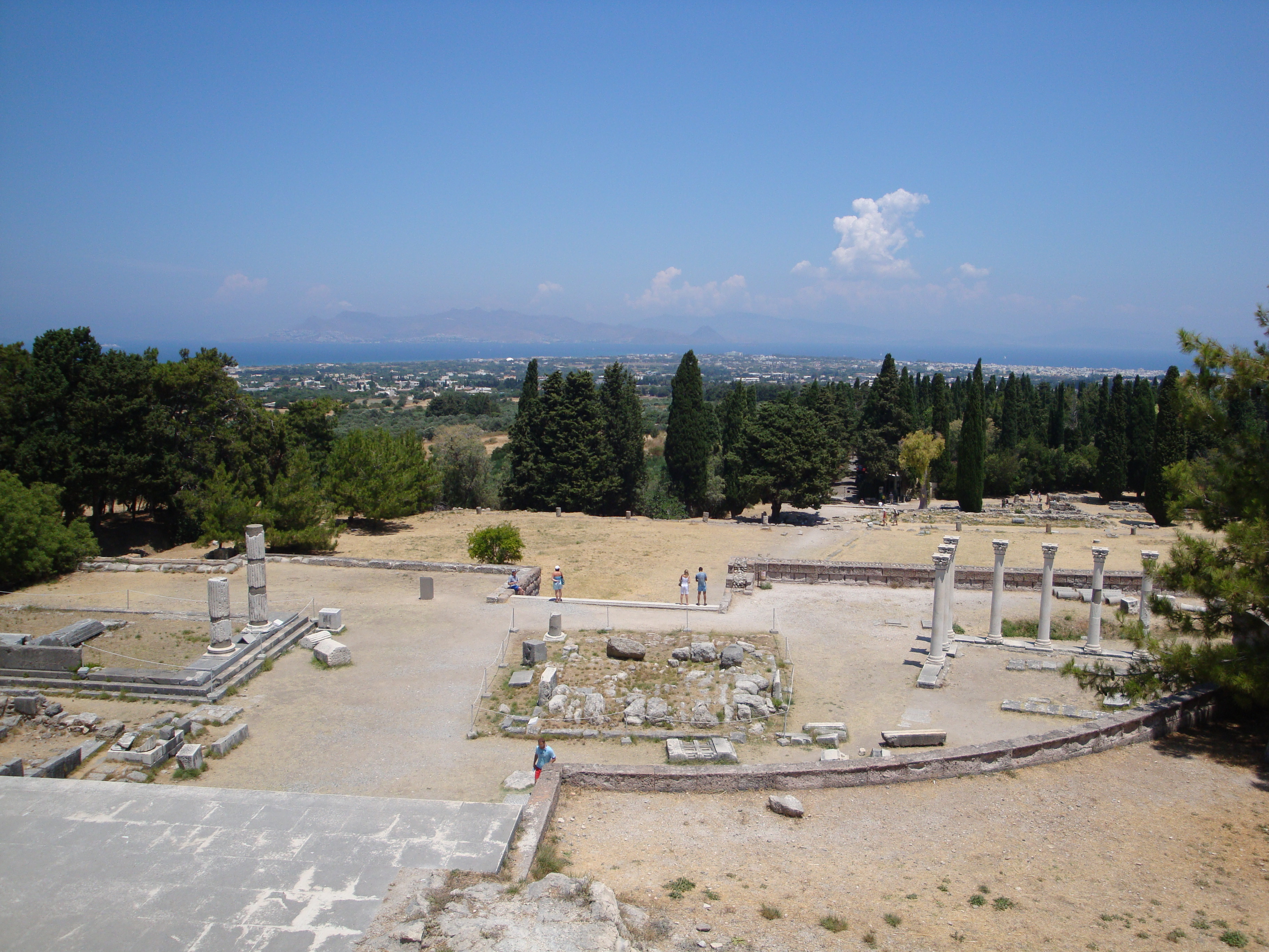 Tempelj nad mestom Kos.